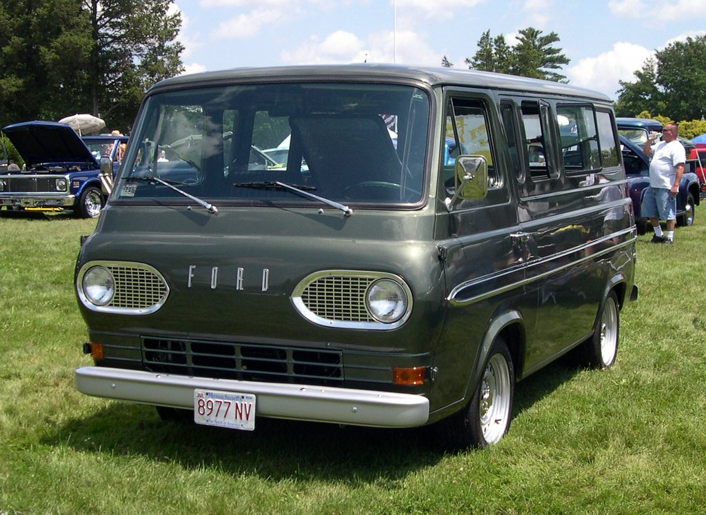 Ford Falcon van